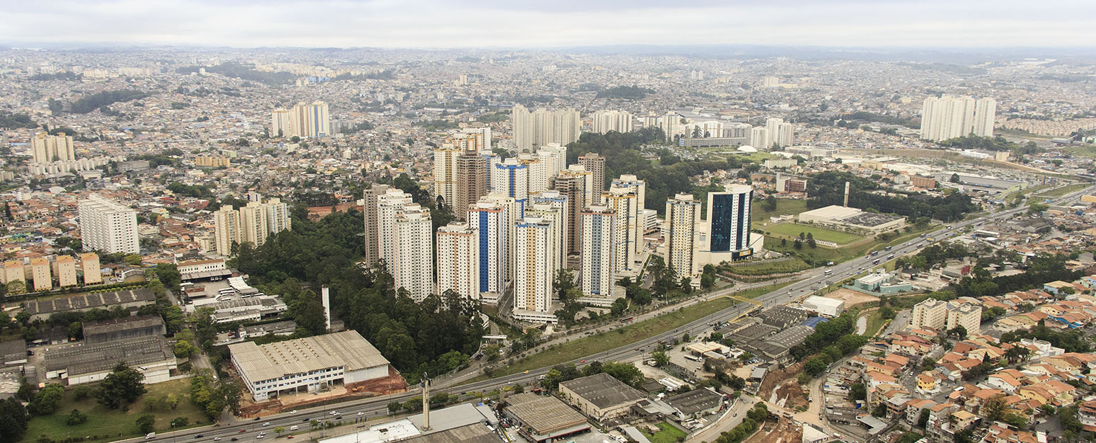 Vista aérea da região central de Taboão da Serra/Foto: Reginaldo Maia